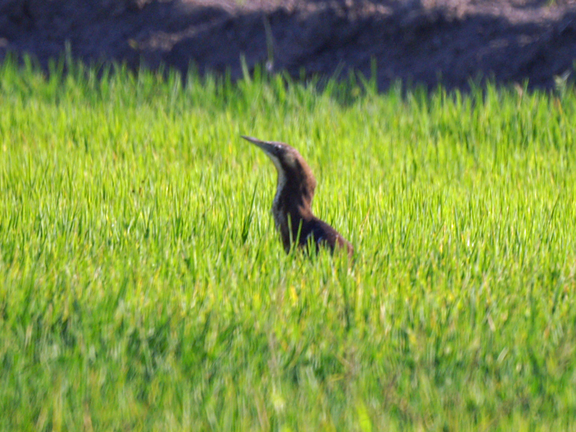 Australasian Bittern (Botaurus poiciloptilus). Leeton, NSW, Australia.